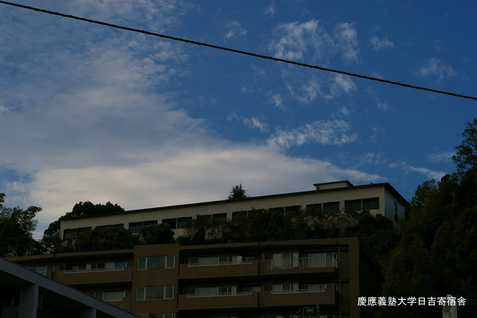 2009.5日本国内で塾生 (talk)が撮影。